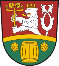 Pivkovice znak